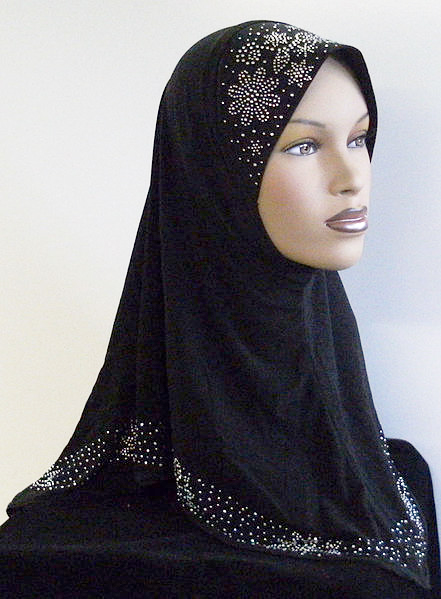 habillement modeste pour des musulmans et des non-musulmans